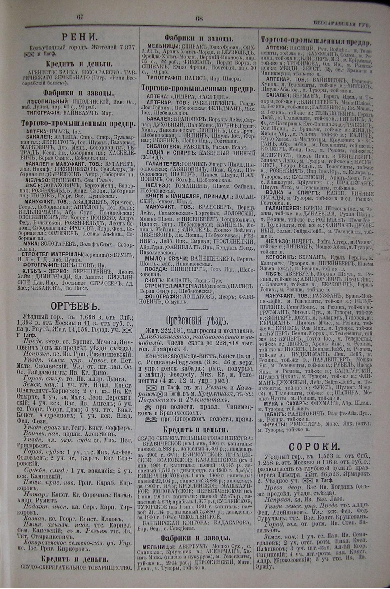 Стр. 67-69 (Рени, Оргеев и Оргеевский уезд, Сороки) из адрес-календаря Российской империи "Вся Россия", 1902.